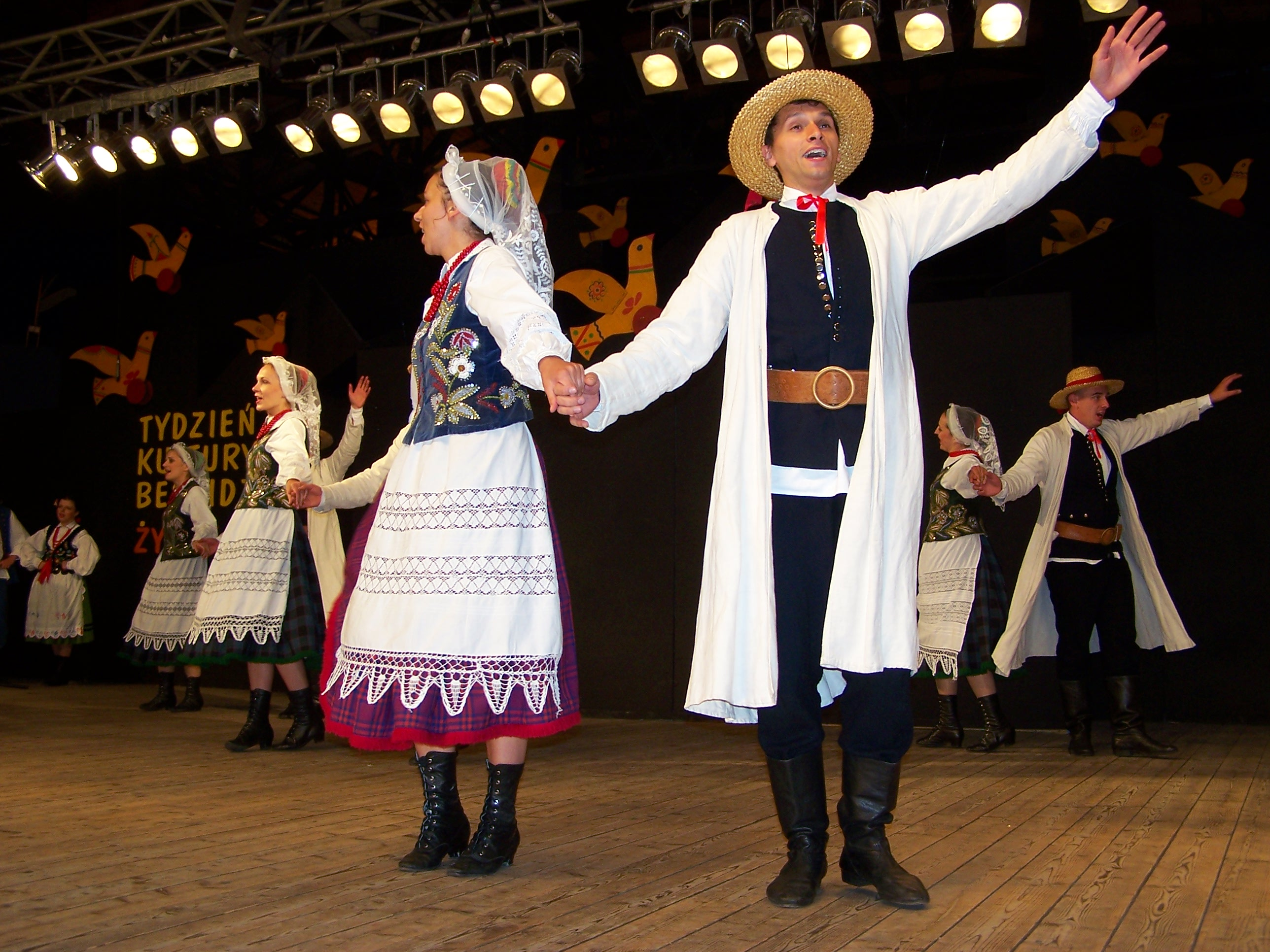 Występ zespołu Połoniny z Rzeszowa podczas 43. Tygodnia Kultury Beskidzkiej w Żywcu.